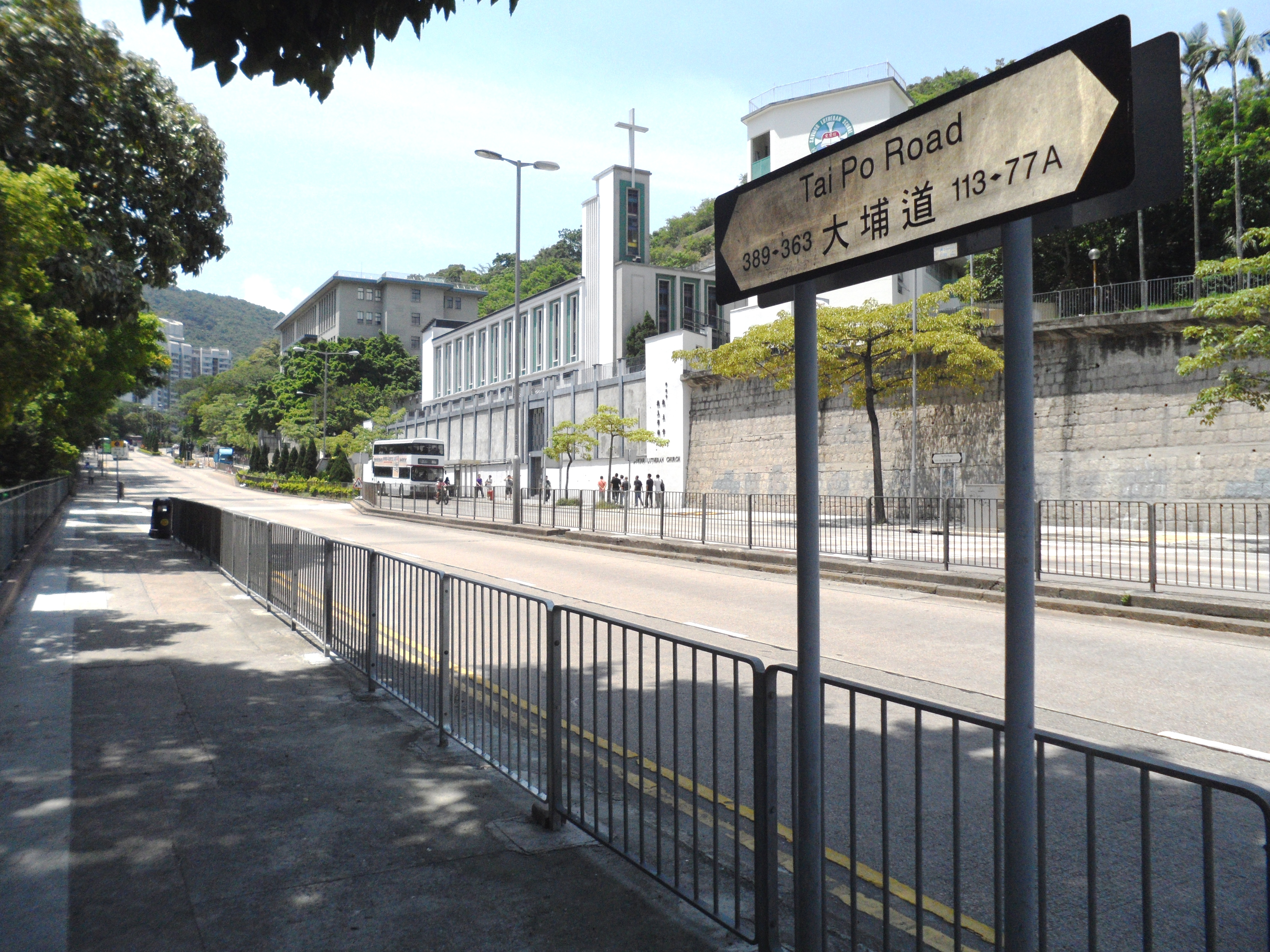 大埔道鄰近九龍道路段